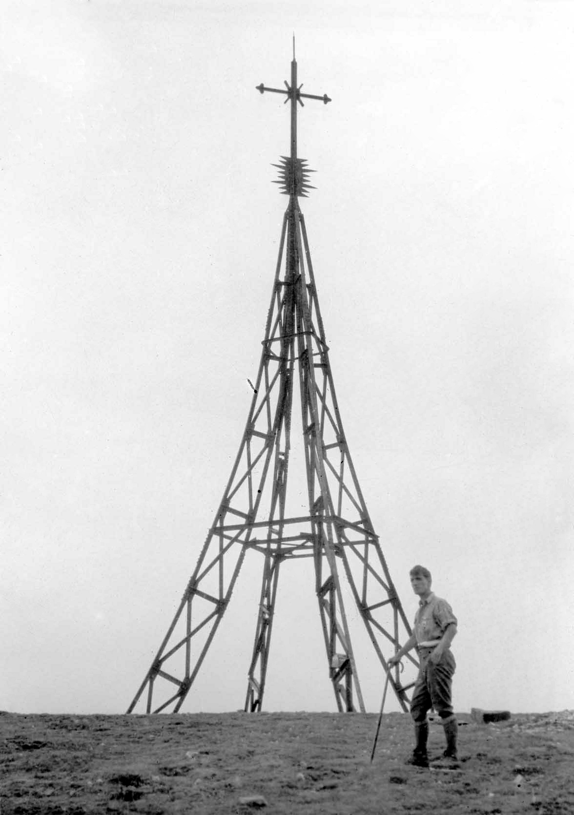 Indalecio Ojanguren en la cumbre del Gorbea. Año desconocido. Es el montañero Indalecio Ojanguren en su juventud. La foto es de principios del siglo XX según han dicho.